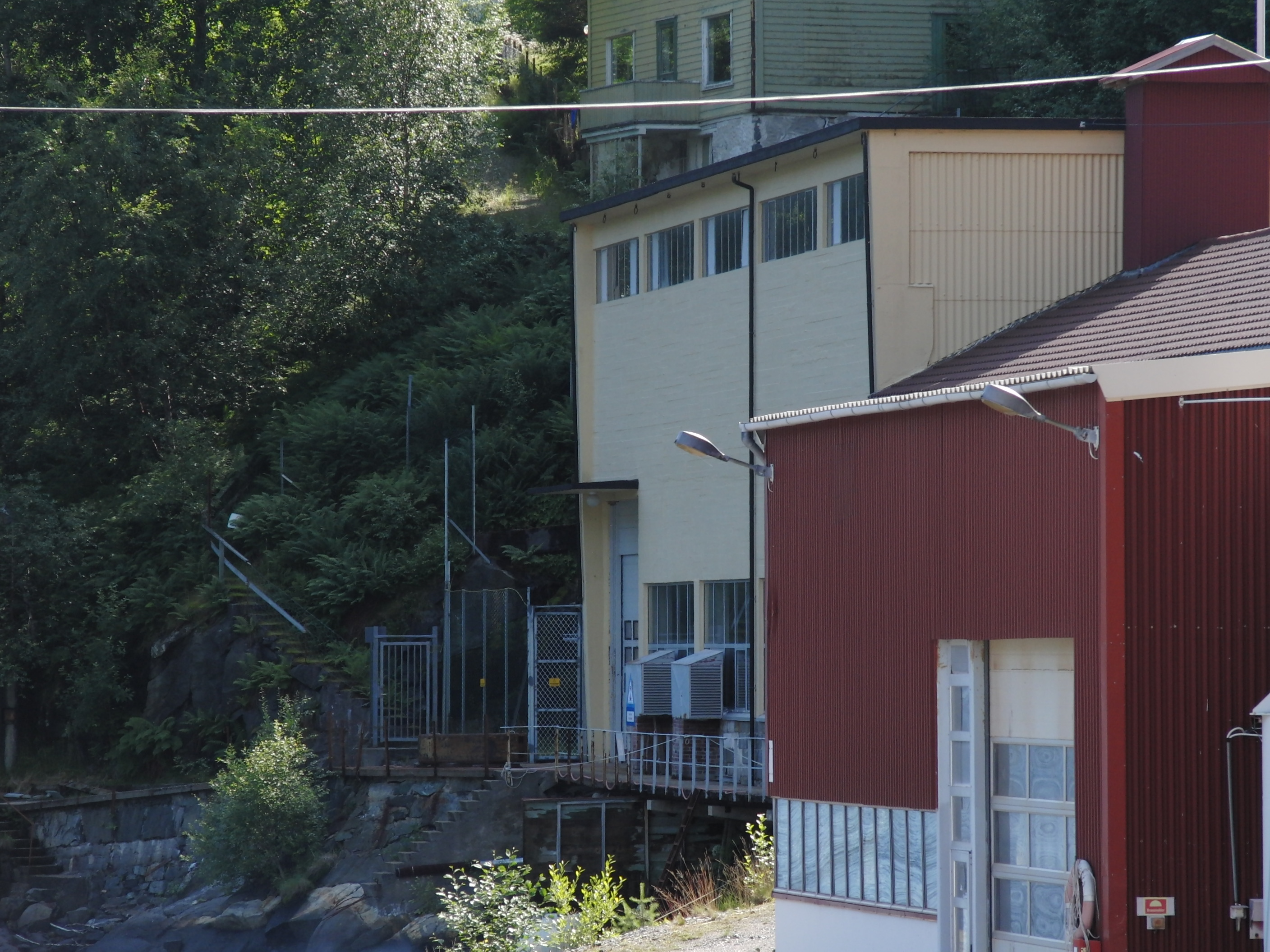 Dyrnesli kraftverk